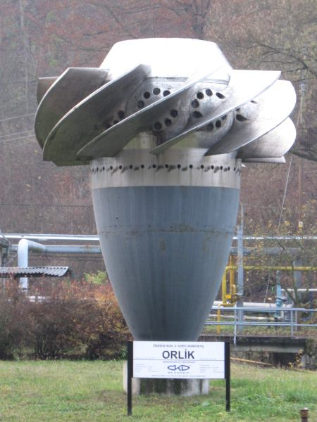 ČKD Blansko - Kaplanova turbína z elektrárny Orlík